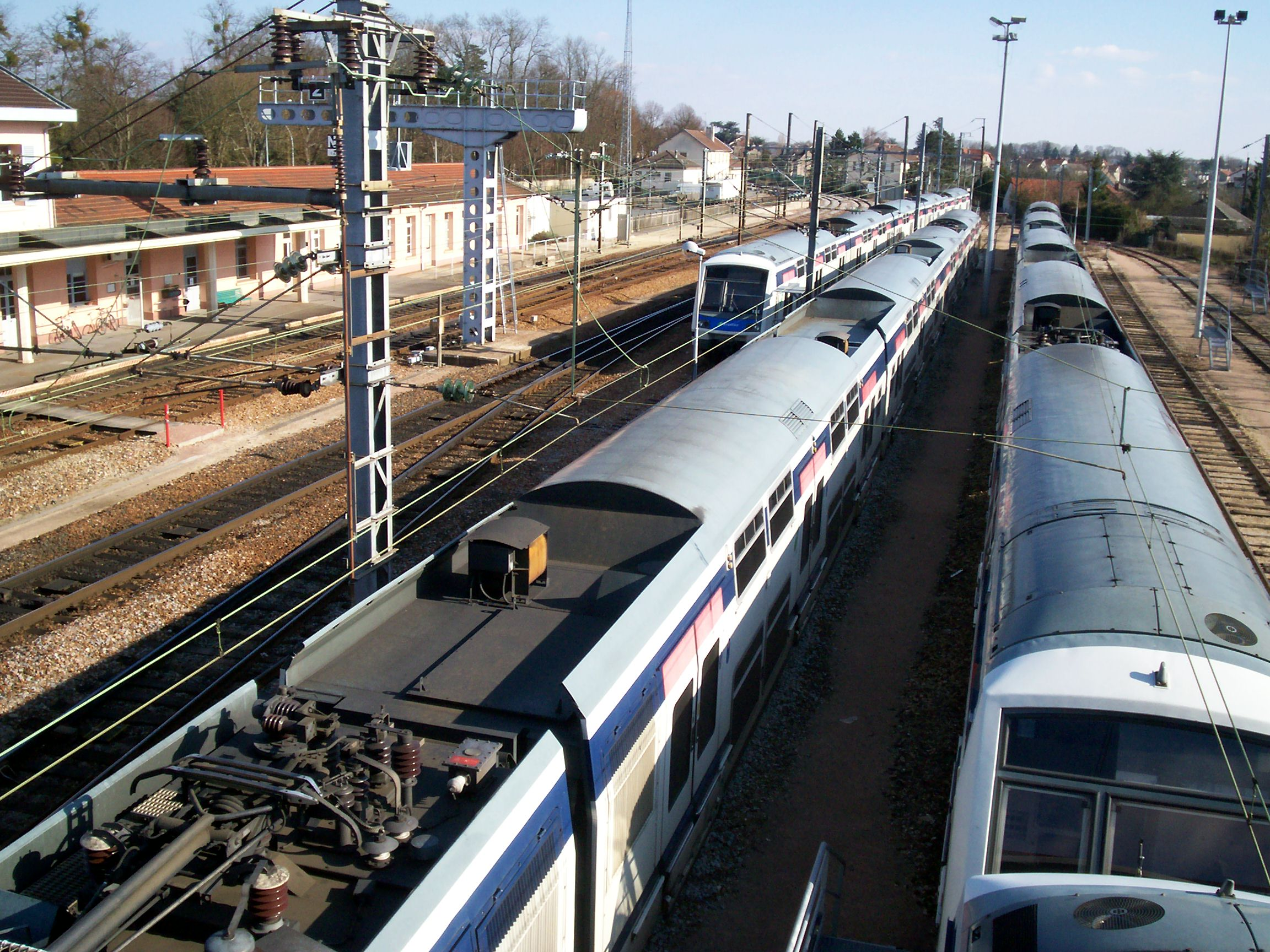 Plusieurs rames Z 22500 garées à Gretz